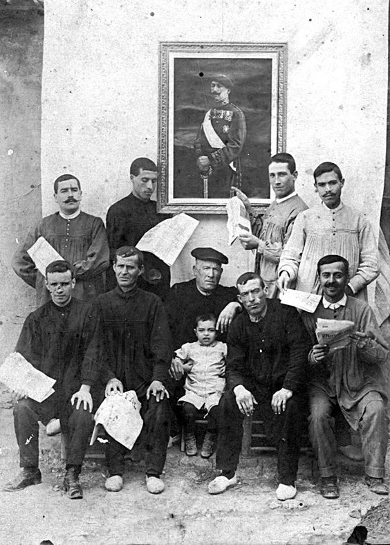 Junta directiva del casino y representación de la juventud carlista delante del retrato de Don Jaime de Borbón. Fotografía del año 1921.